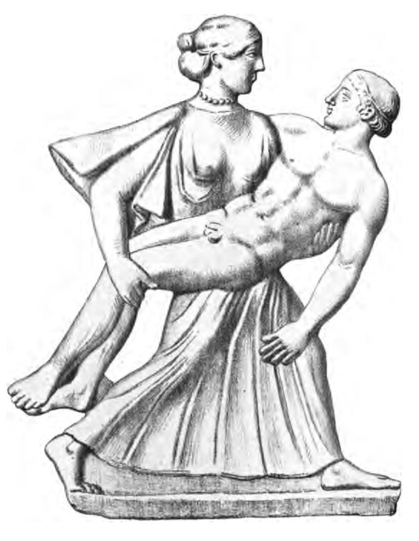 Greek Terracotta from Attica Published in E. Curtius, "Zwei Terracotten des Antiquariums in Berlin." Archaologische Zeitung, New Series, Vol. VIII., p. 166-8, including Tafel 15 on p. 245. 4to. Berlin, 1876.